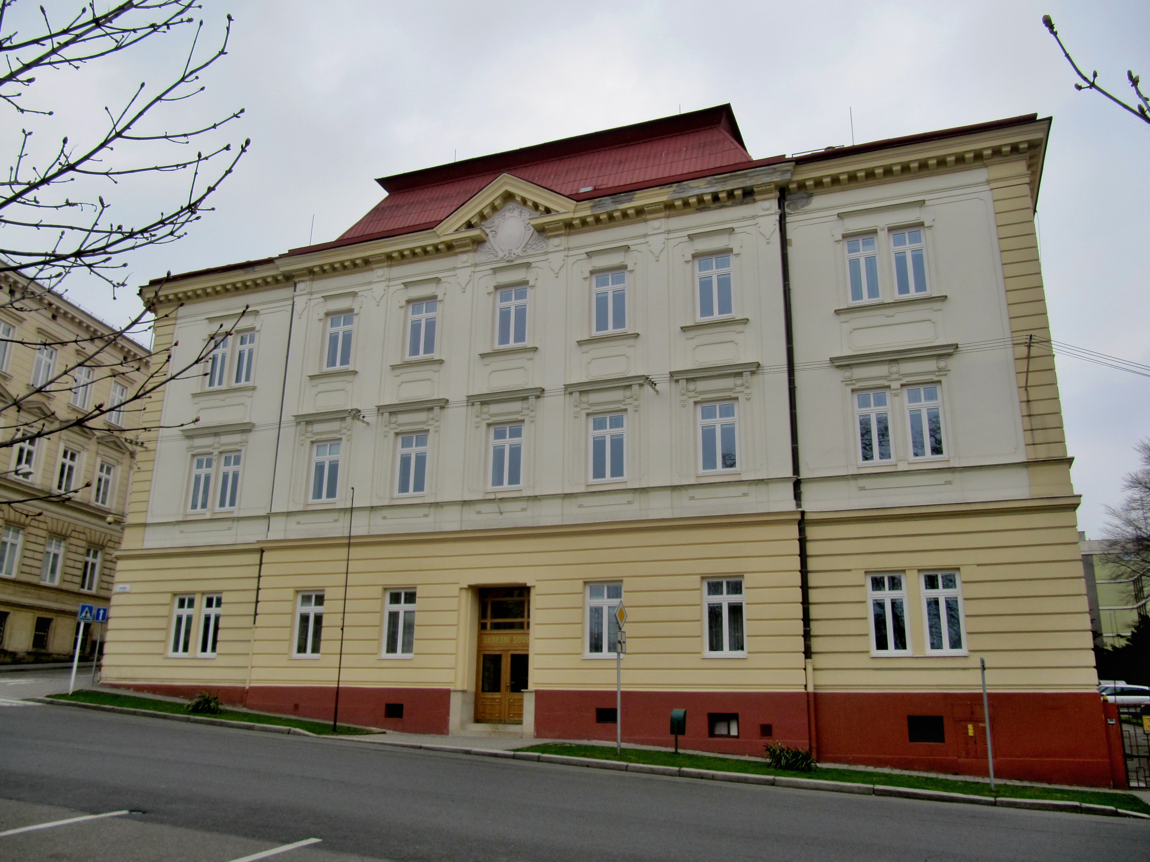 Nový Jičín, okresní soud